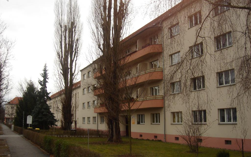 Häuserzeile Aachener Straße, Großsiedlung Dresden-Trachau, erbaut von Schilling & Graebner